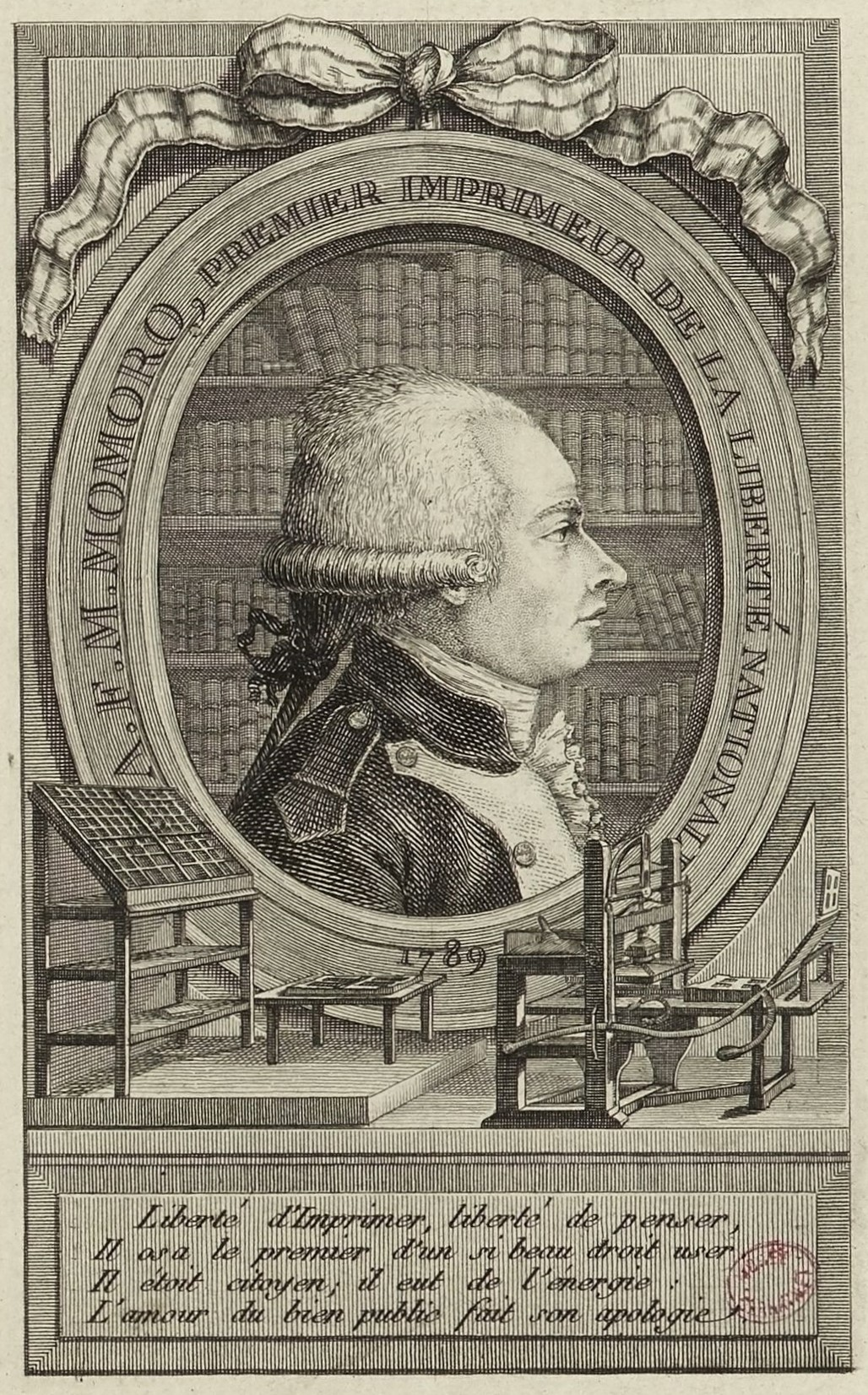 Der französische Drucker und Revolutionär Antoine-François Momoro (1756–1794)